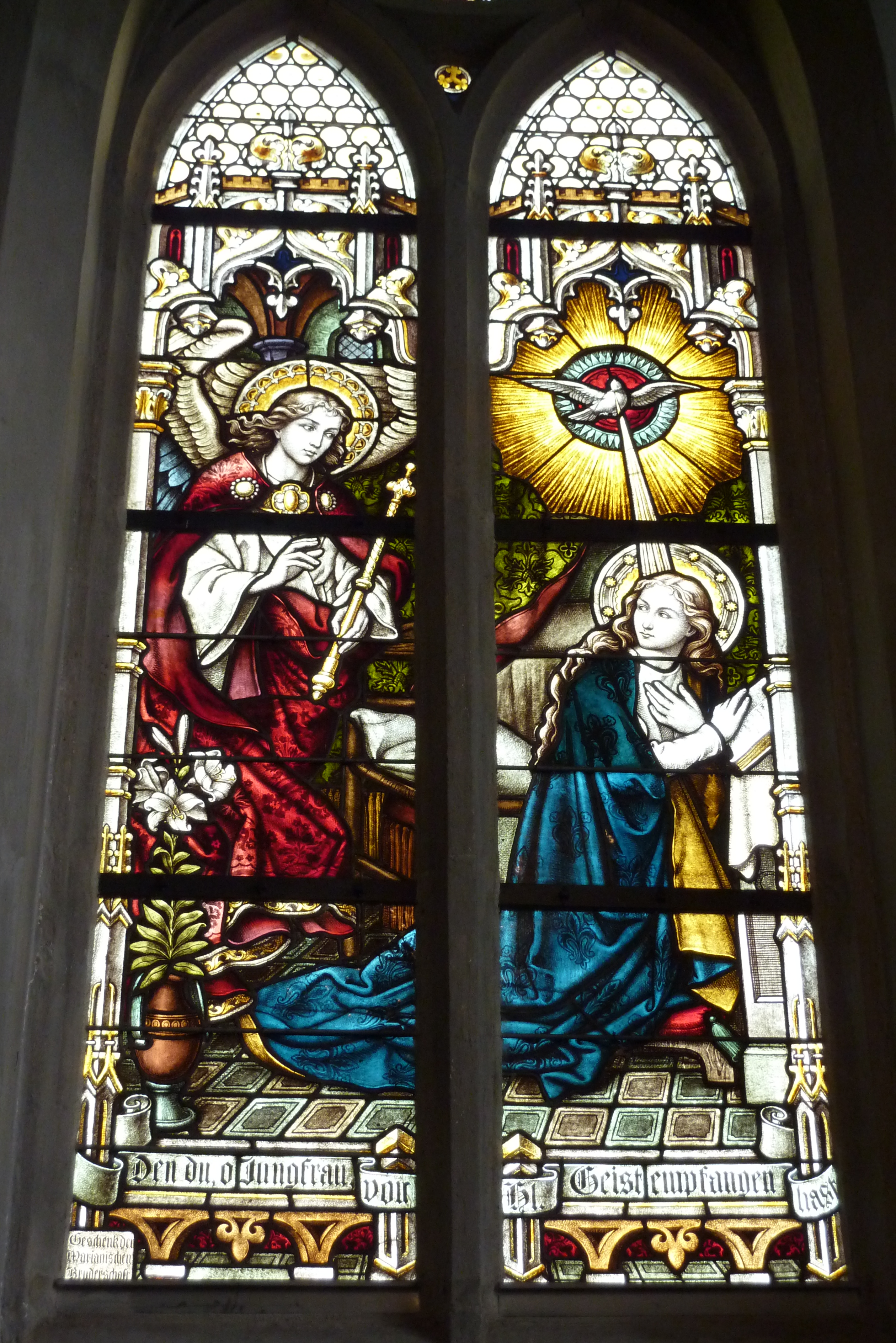 katholische Pfarrkirche St. Nikolaus in Kottenheim, Glasfenster mit der Darstellung: Mariä Verkündigung, Hersteller: Glasmalerei Melchior (Köln) lt. Firmenarchiv H. Oidtmann